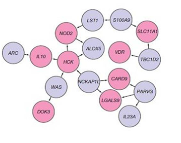 Se aprecian los loci que provocan la IBD (Inflammatory bowel disease), interconectados entre ellos. Los rojos son aquellos que participan activamente, mientras que los azules son aquellos que restan inactivos.